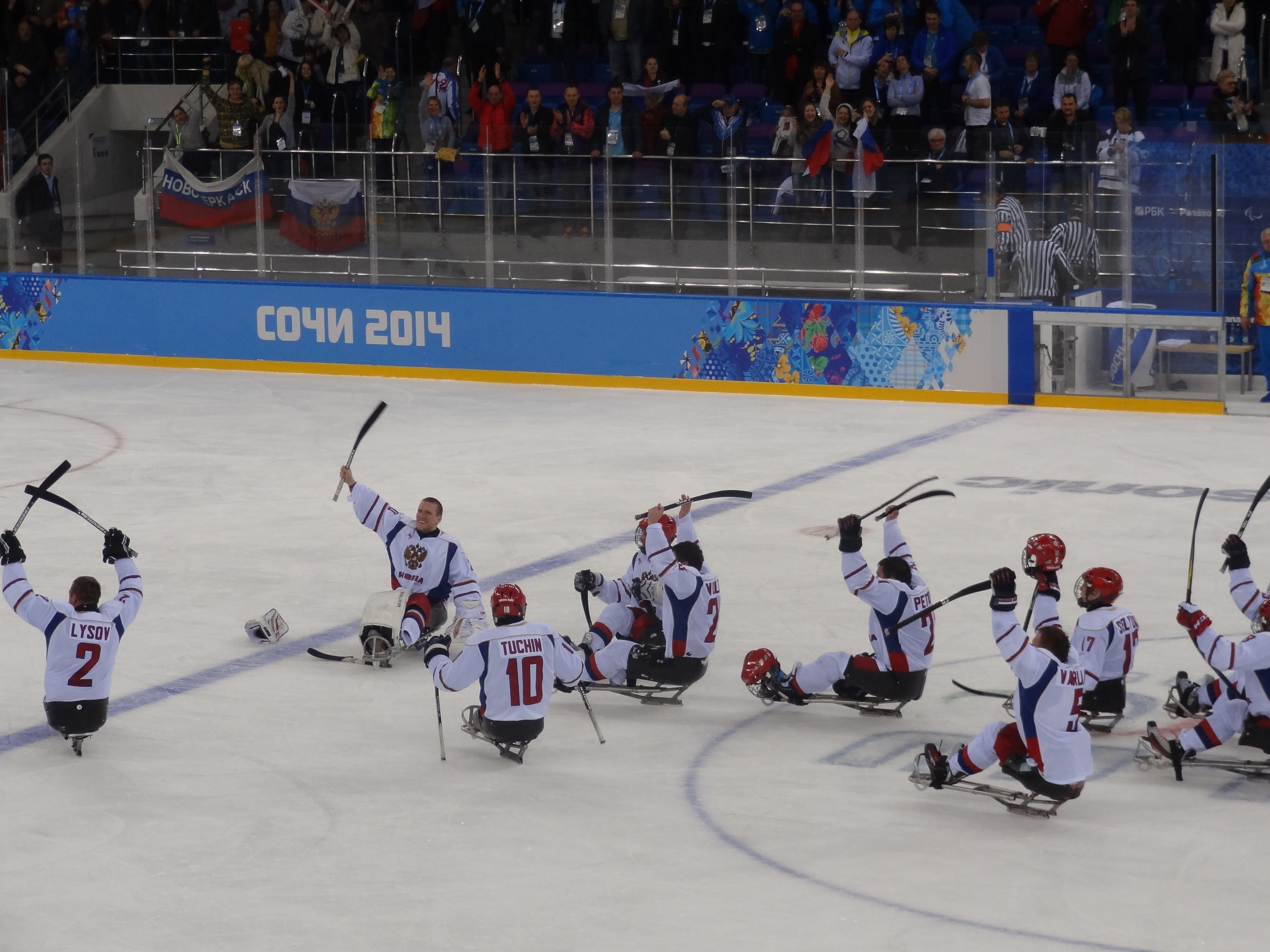 Сочи, 11 марта, 2014 года. Сборная России по следж-хоккею одержала победу над командой США на Паралимпиаде в Сочи. Россияне в заключительном матче группового этапа выиграли со счетом 2:1 и заняли первое место в группе.